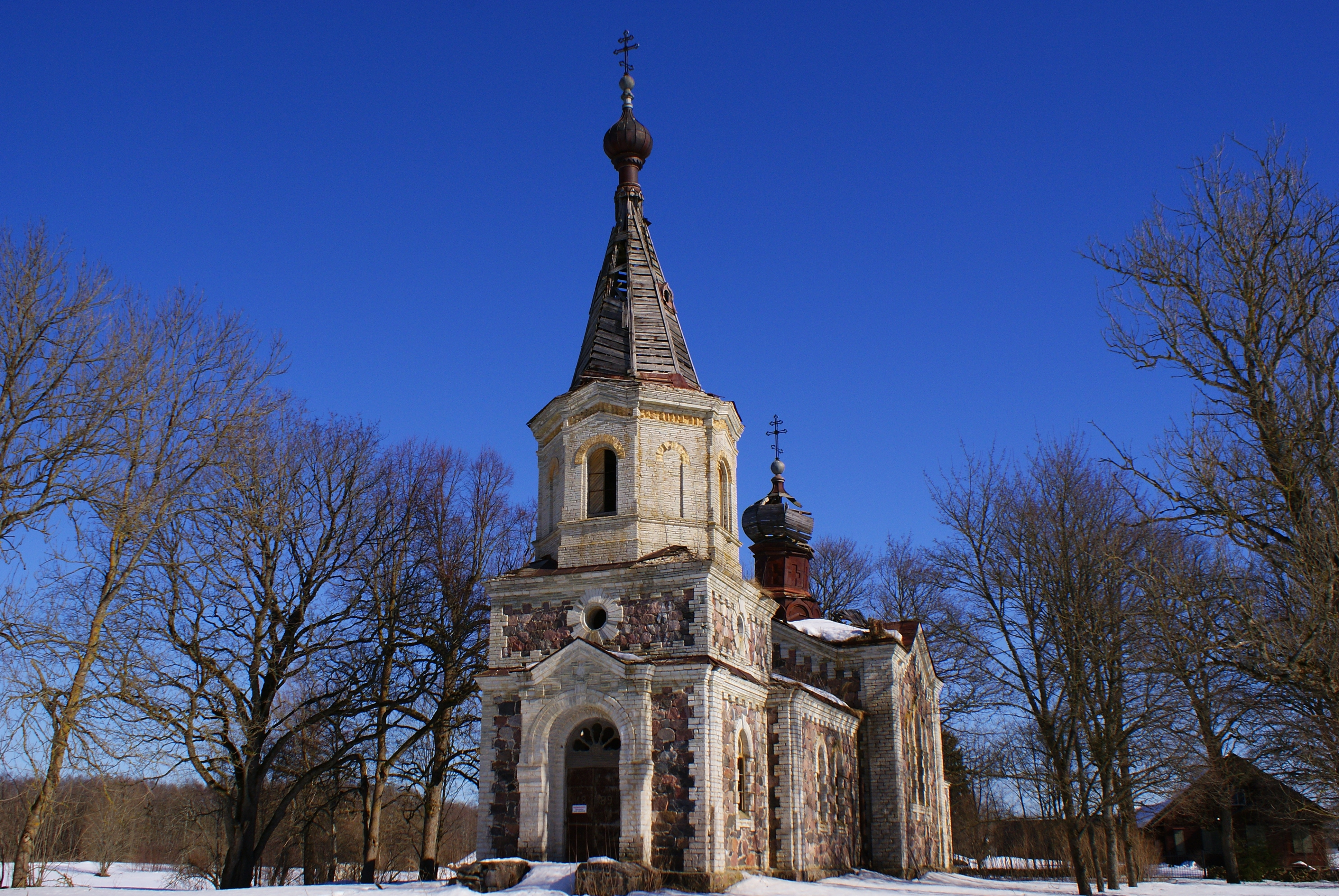 Väike-Lähtru õigeusu kirik